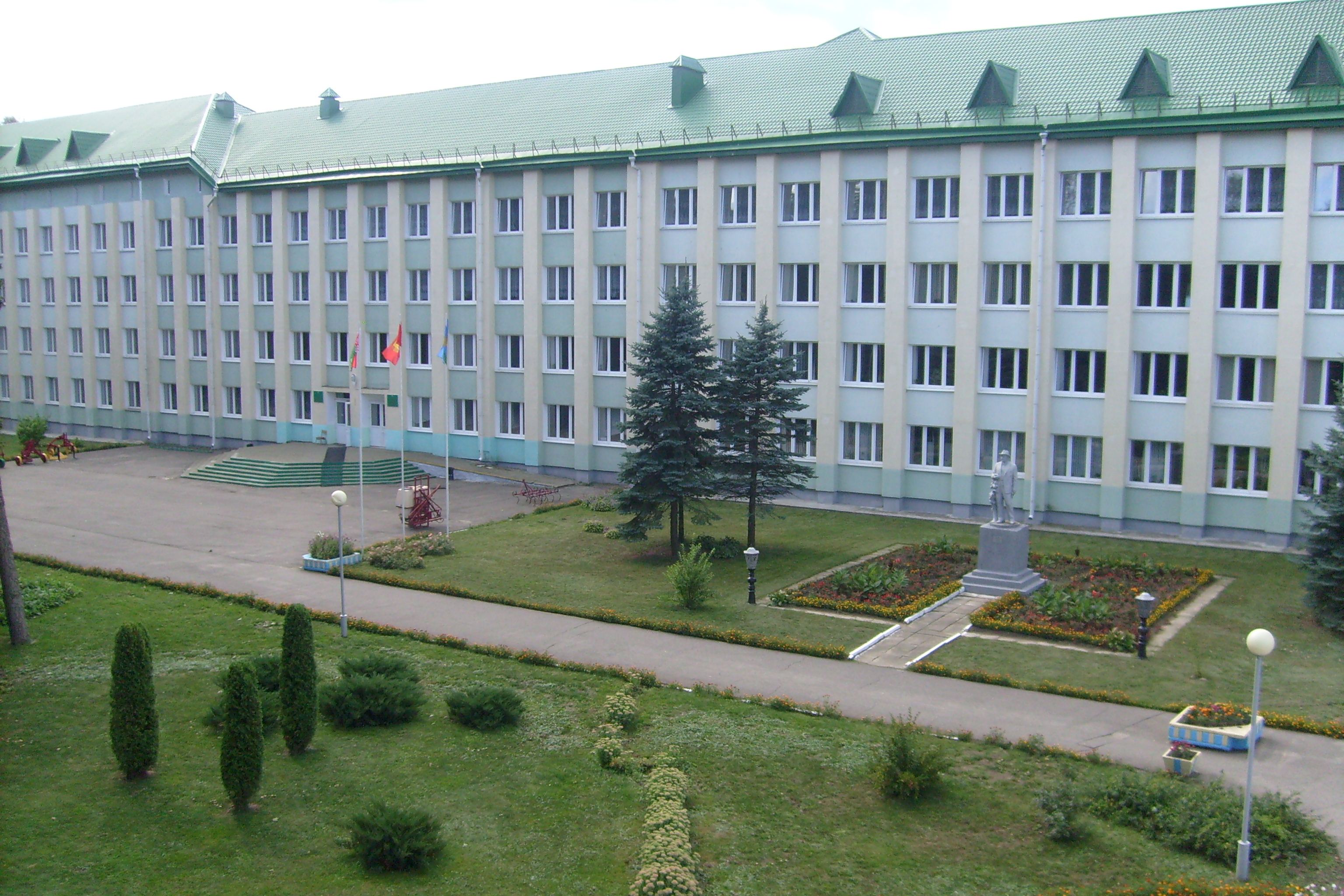 Жиличский государственный сельскохозяйственный колледж